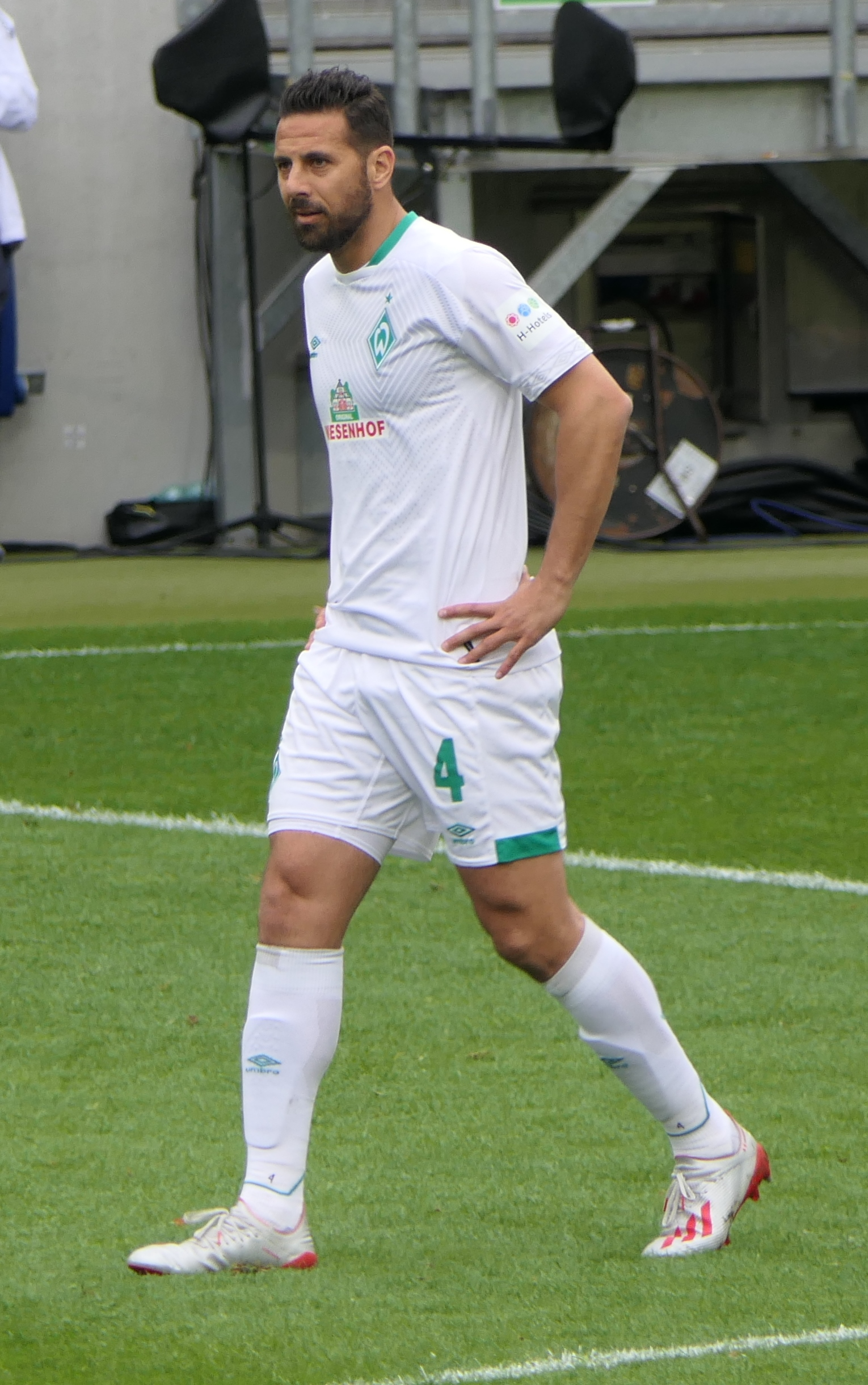 Der Fussballprofi Claudio Pizarro im Trikot vom SV Werder Bremen beim Auswärtsspiel gegen die TSG Hoffenheim am 11.05.2019.